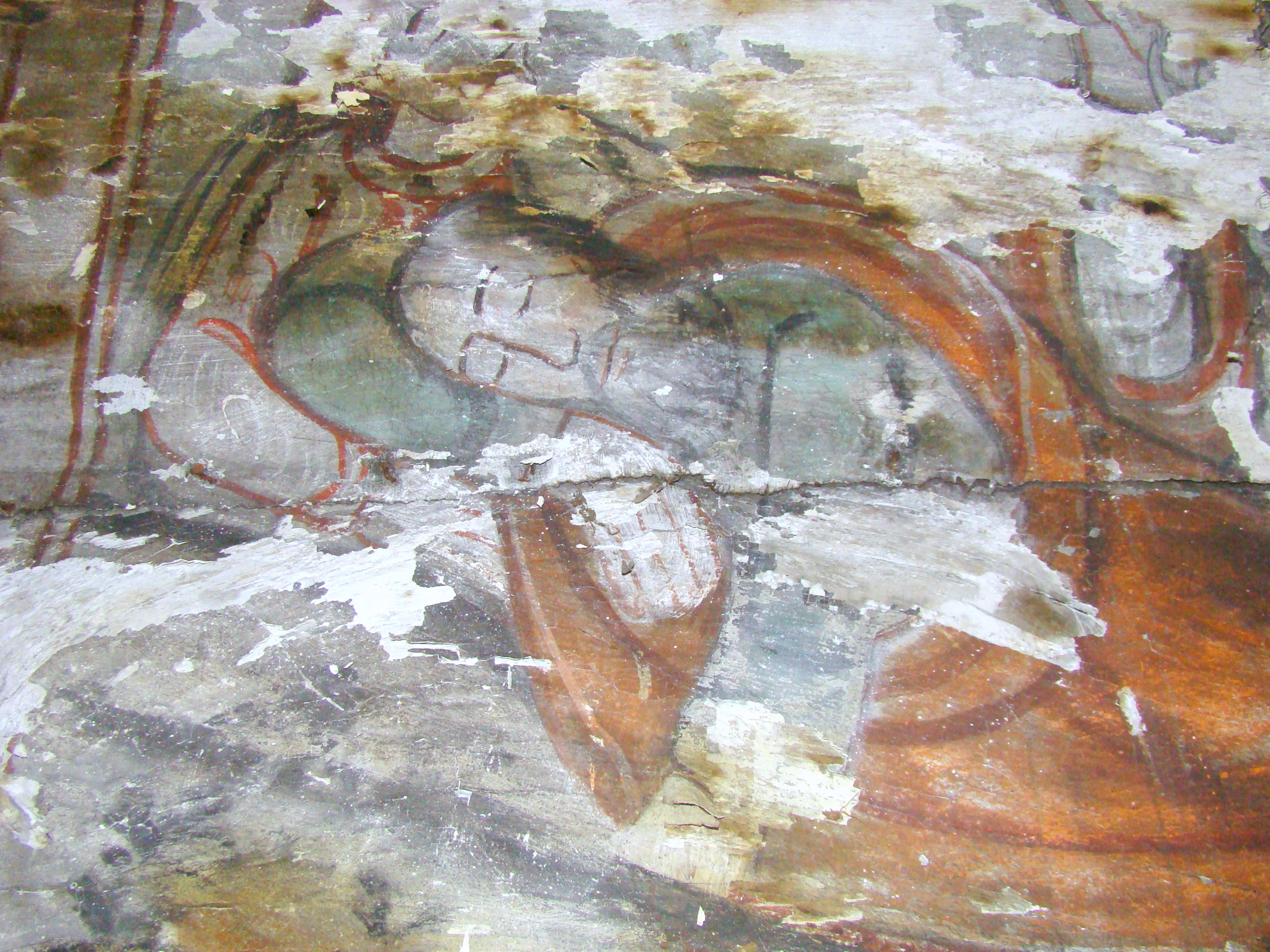 Biserica de lemn "Sfinții Arhangheli Mihail şi Gavriil" din Hida, județul Sălaj